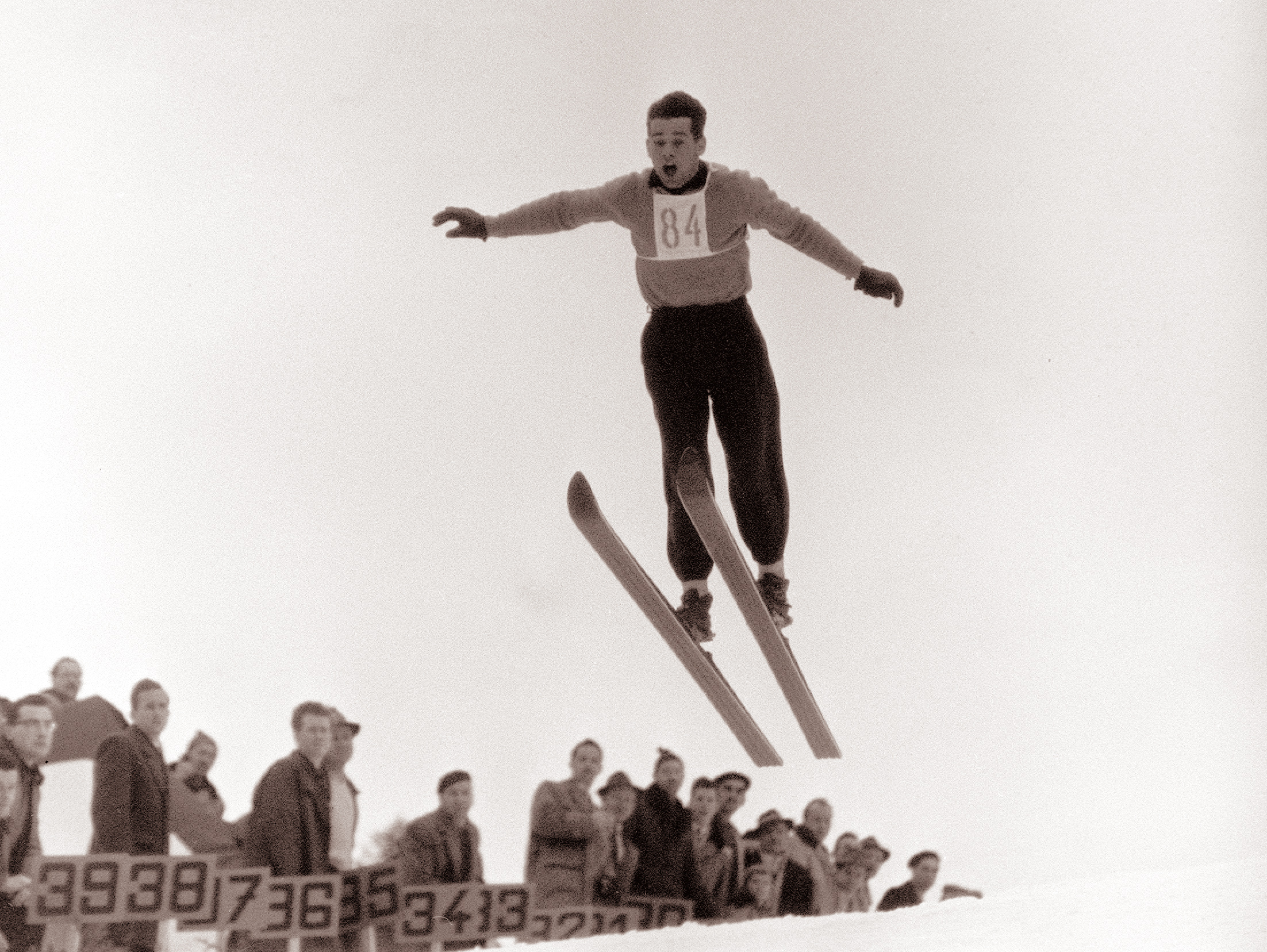 17. državno prvenstvo v smučarskih skokih v Črni na Koroškem